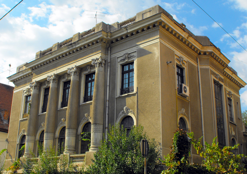 Dumbrava Rosie 5